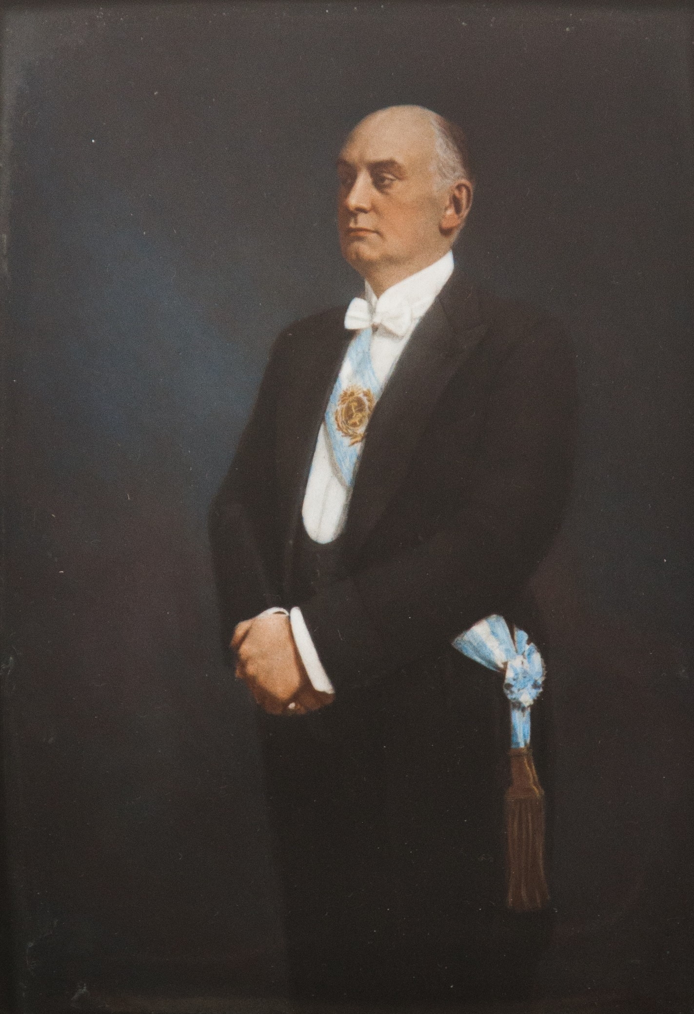 El presidente Marcelo T. de Alvear luciendo la banda presidencial. Marco original.